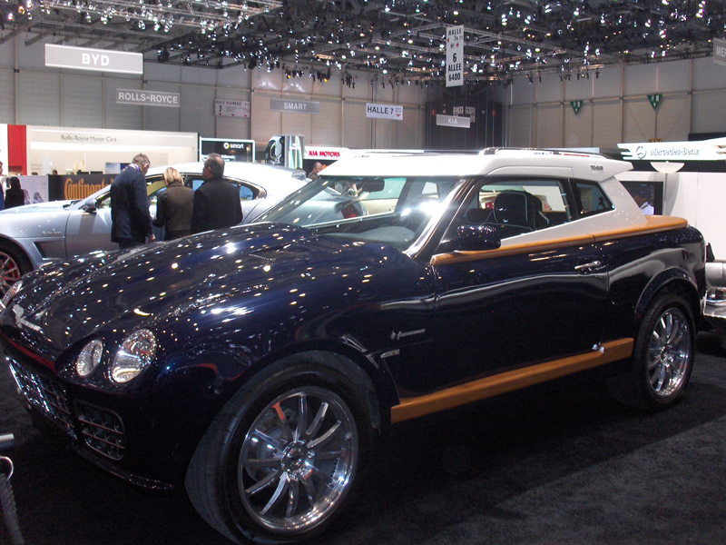 Ein Fornasari-Auto auf dem Genfer Autosalon 2010